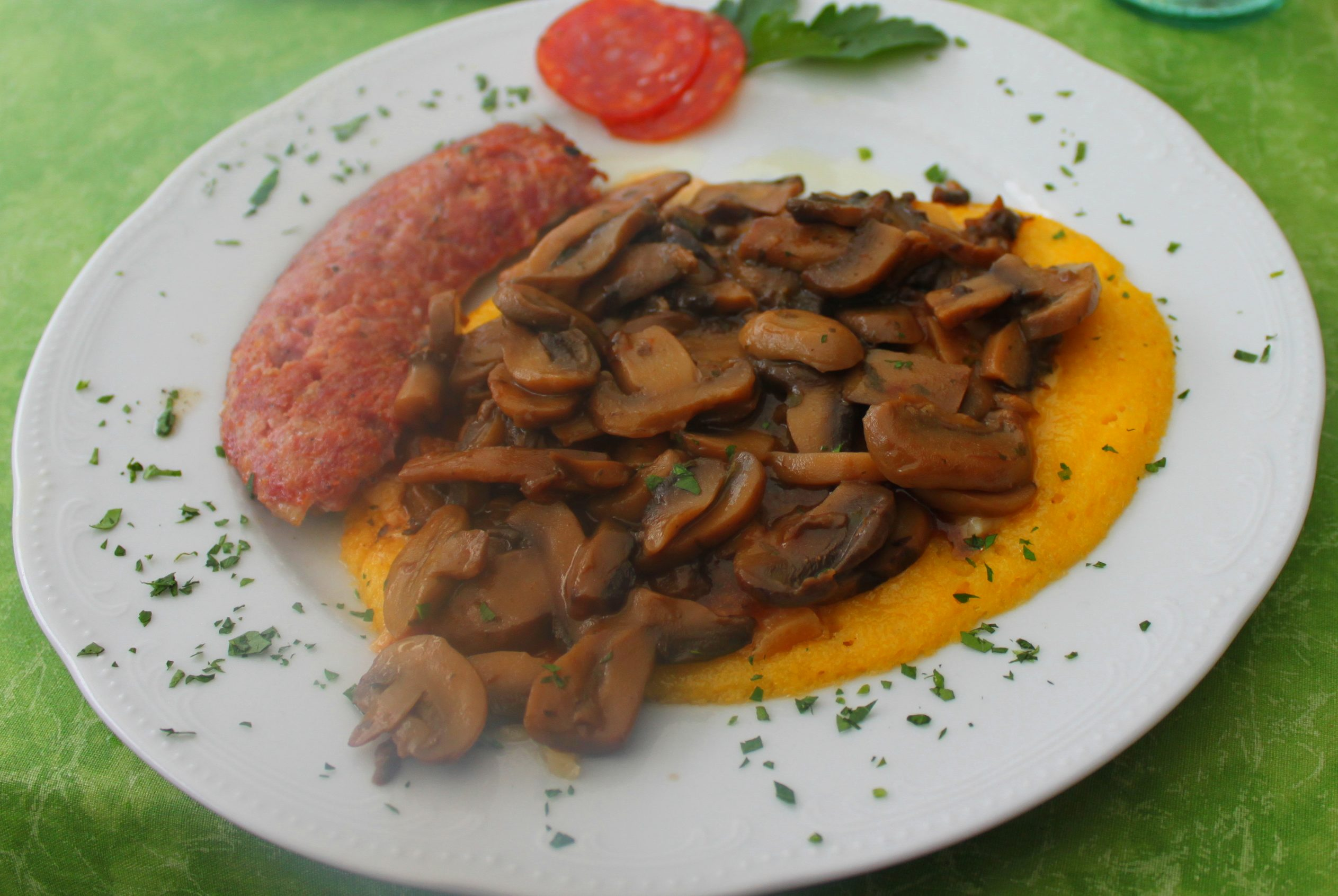 Polenta, Pilze und Bratwurst sind ein typisches trentiner Gericht